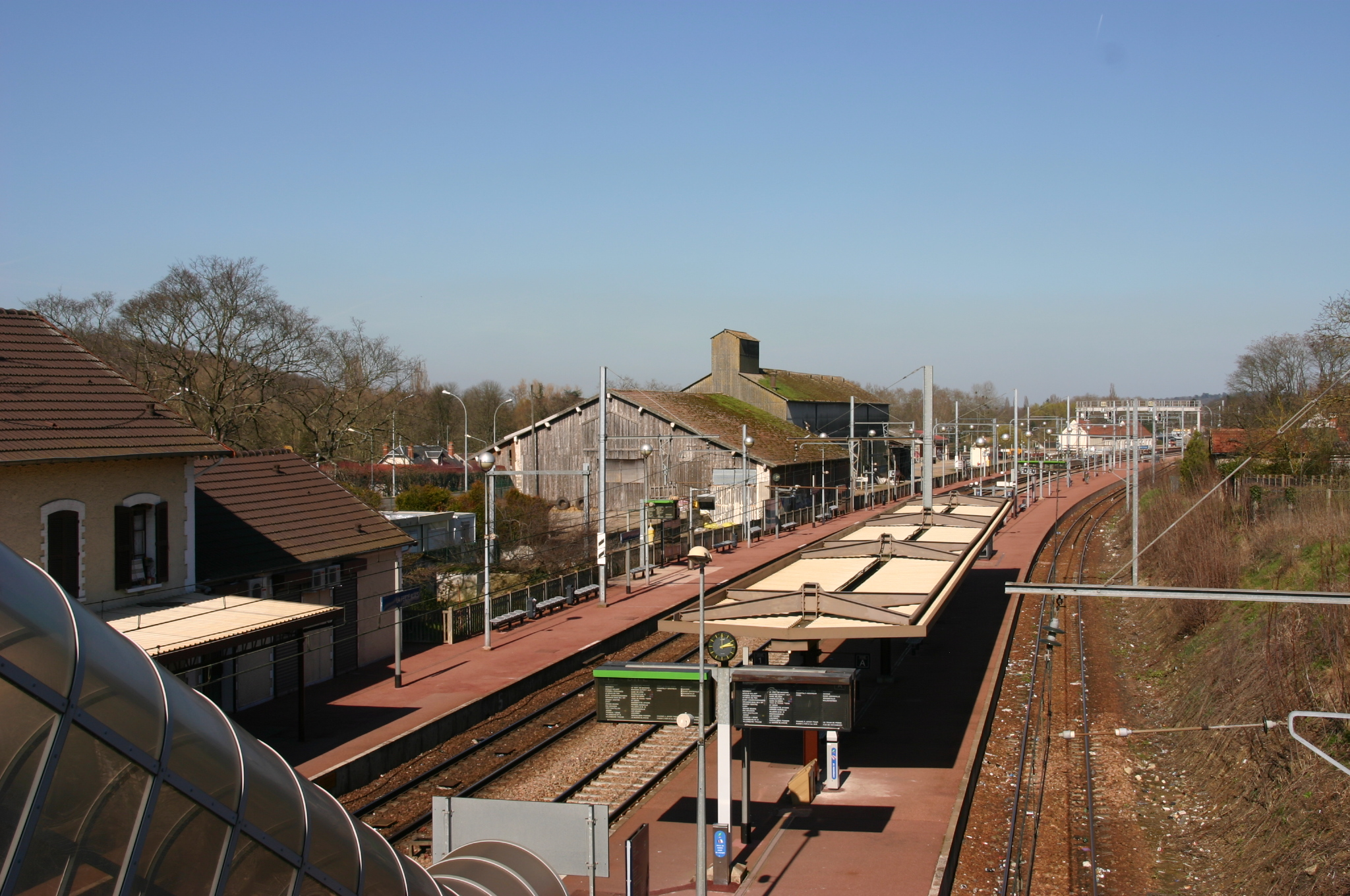 La gare de La Ferté-Alais, La Ferté-Alais, département de l'Essonne (France)